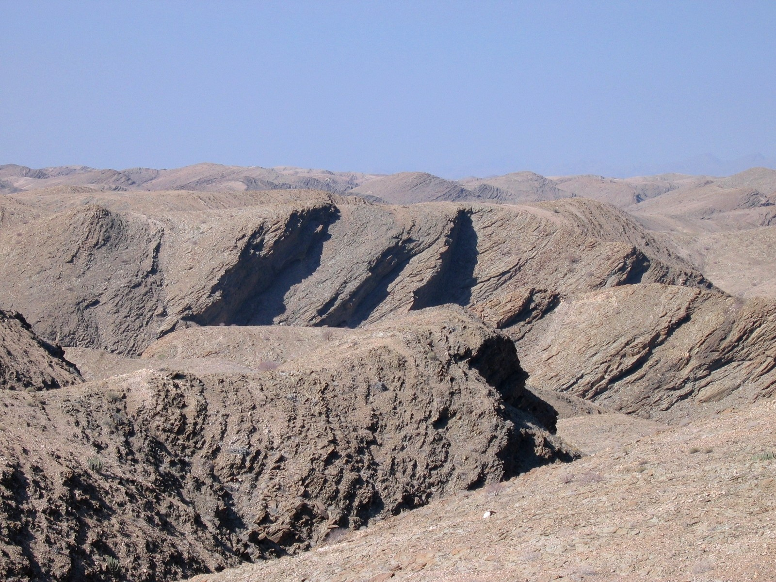 Kuiseb Cañon, Nambia